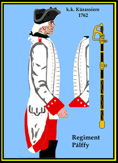 Österreichisches Kürassier-Regiment „Pálffy“ (Aus: L.& F. Funcken - „L'Uniforme et les Armes des soldats de la guerre en dentelle II“) Castermann (Tournai 1976)